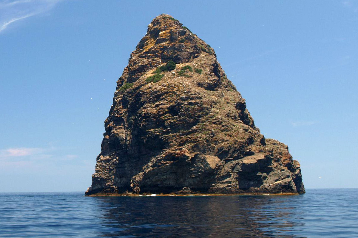 Zapadna strana otoka Jabuke